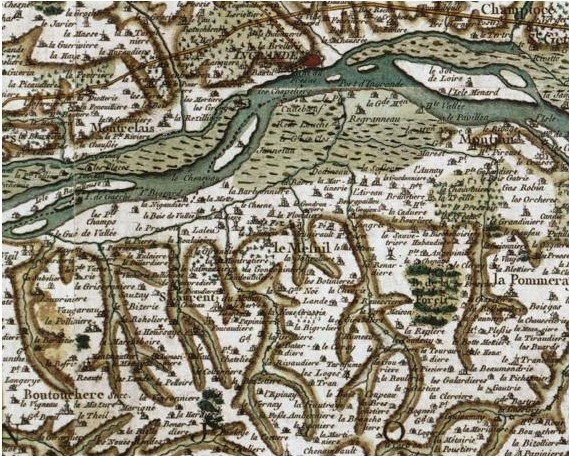 La commune du Mesnil-en-Vallée vers 1750.